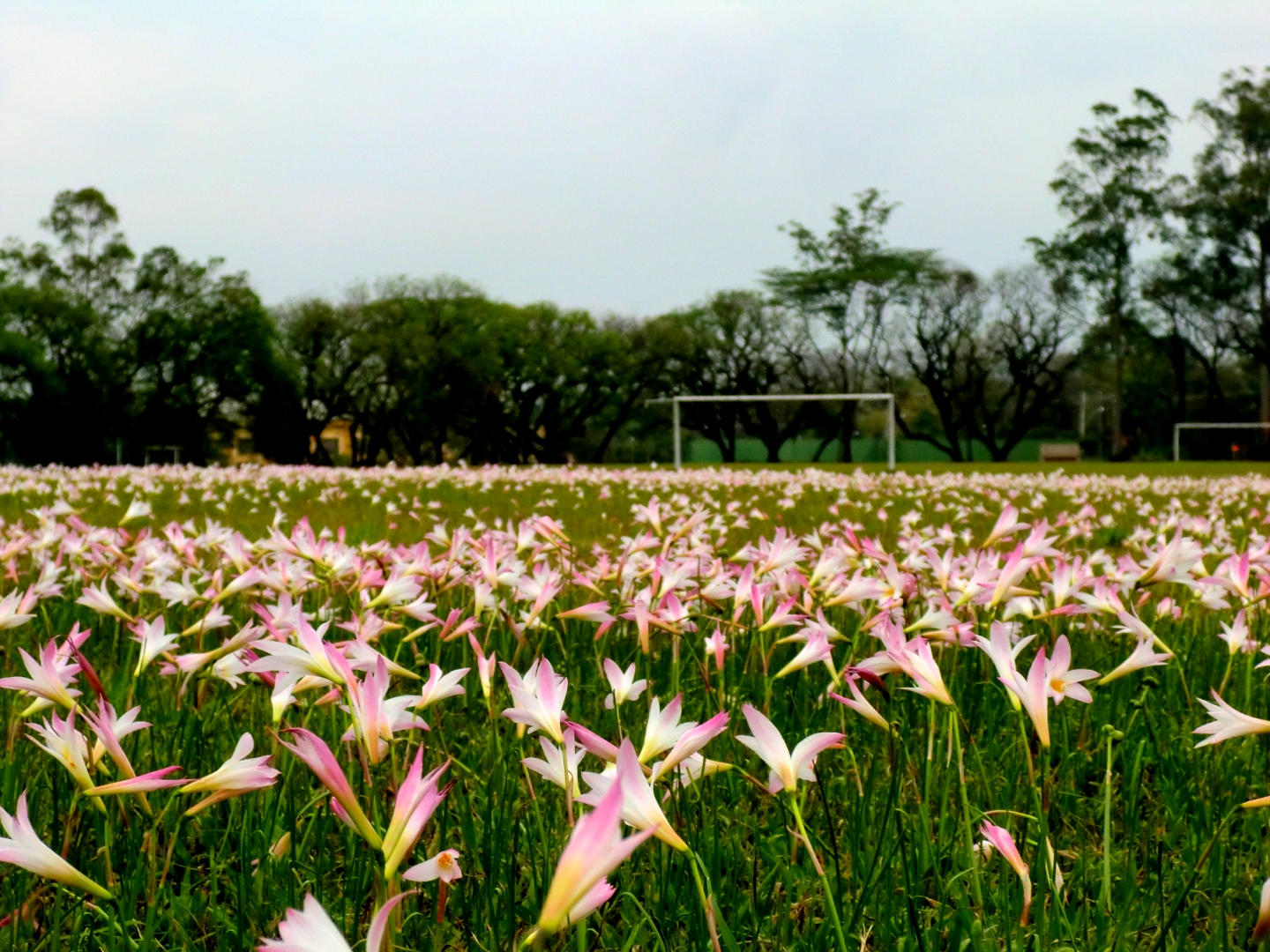 Floração de lírios no Campus Luiz de Queiroz, Piracicaba - SP, da Universidade de São Paulo